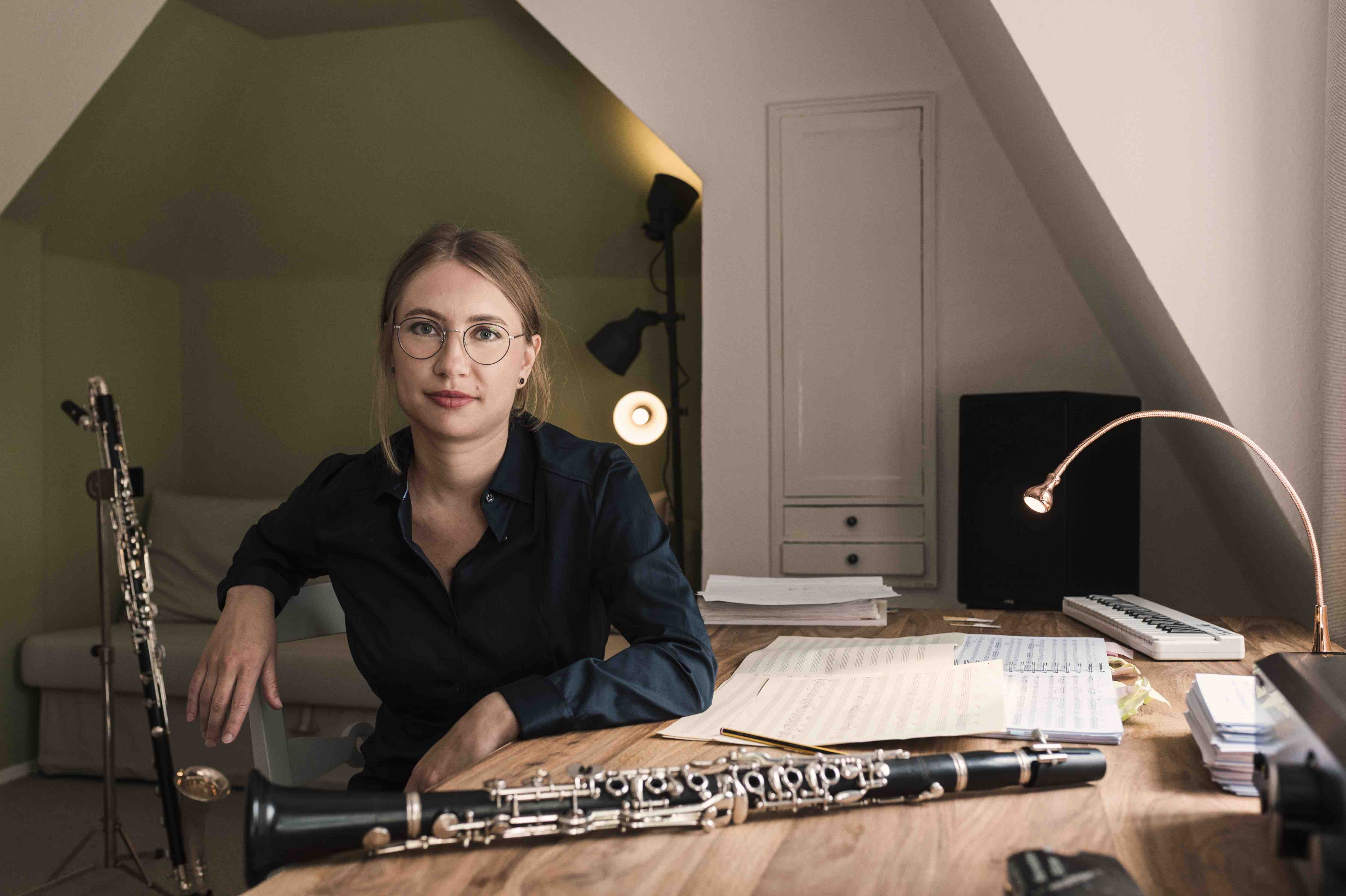 Komponistin & Klarinettistin